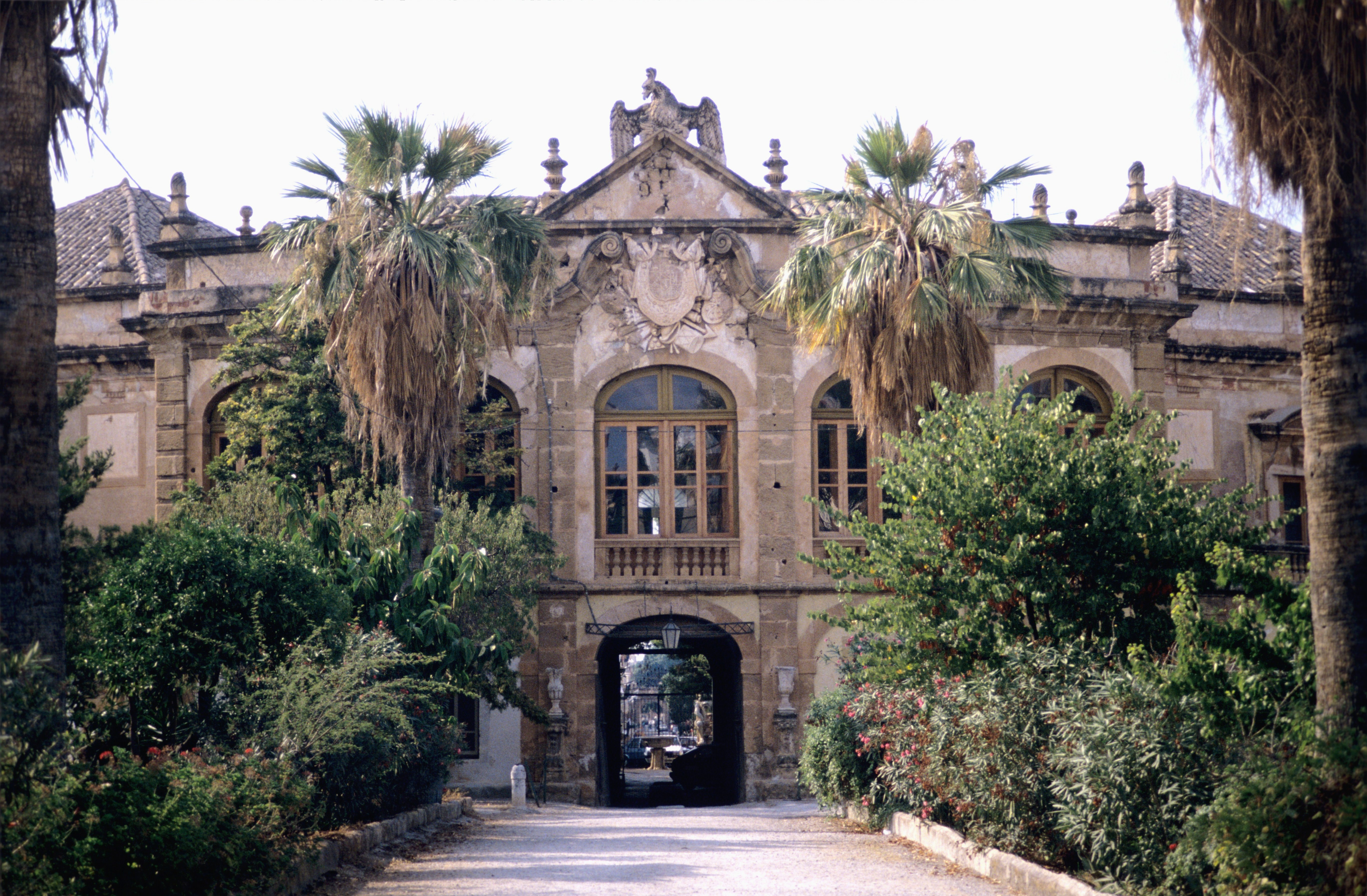 Villa Palagonia: façade de la villa vue depuis l' allée principale du jardin de devant. Bagheria, Sicile, Italie.